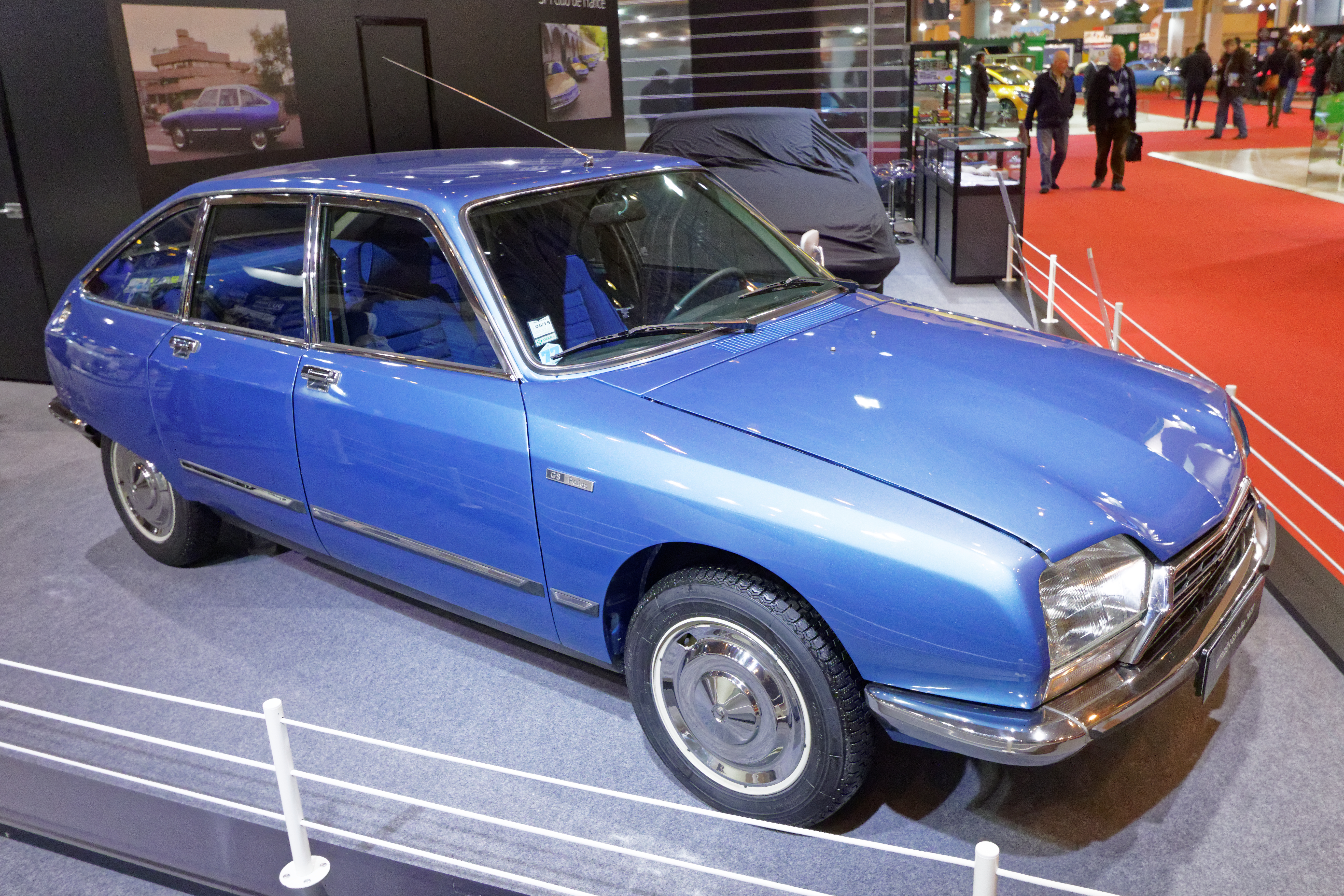 Une des voiture présentée lors du salon Rétromobile de Paris 2015